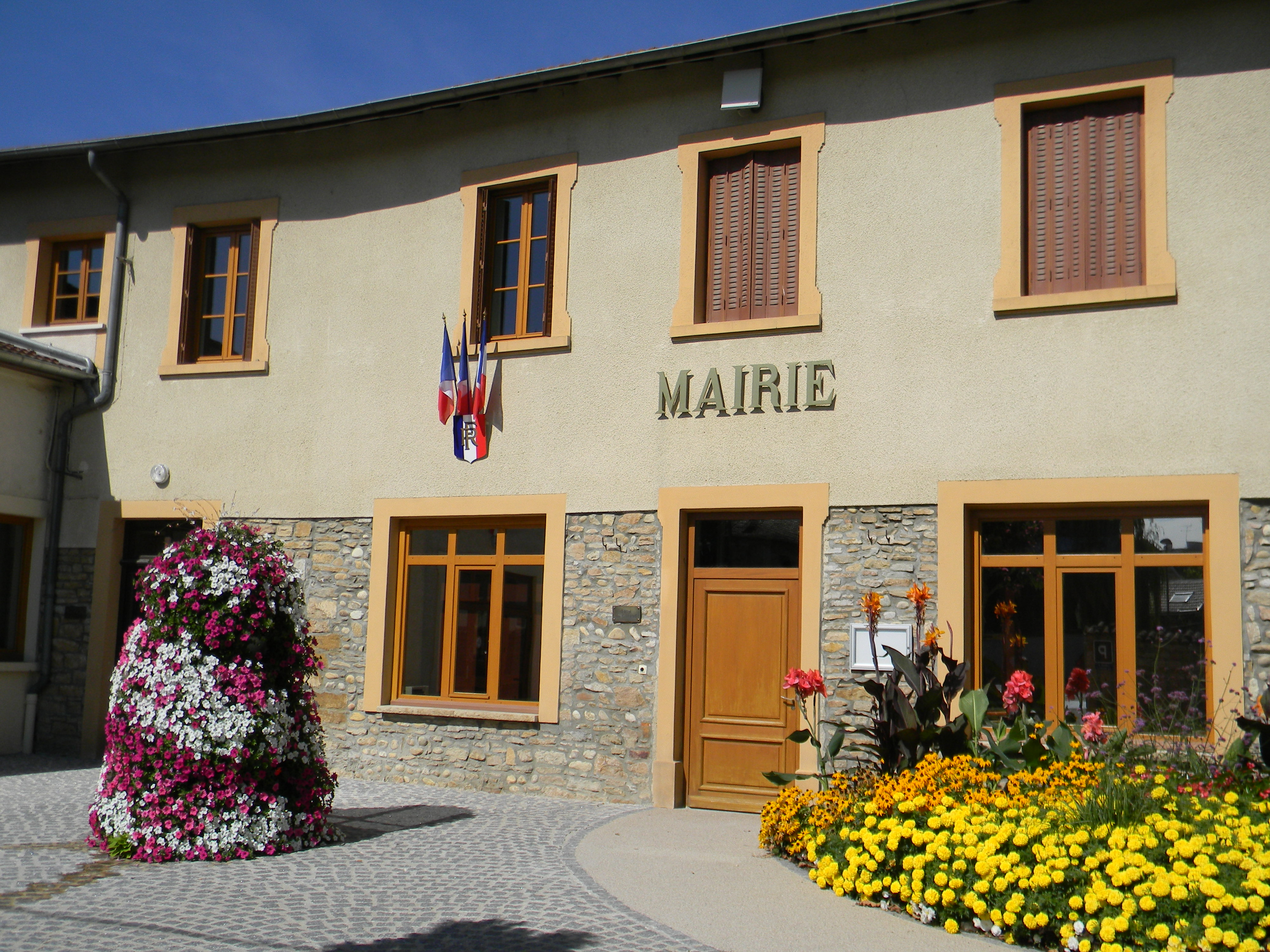 Mairie de Loyettes.